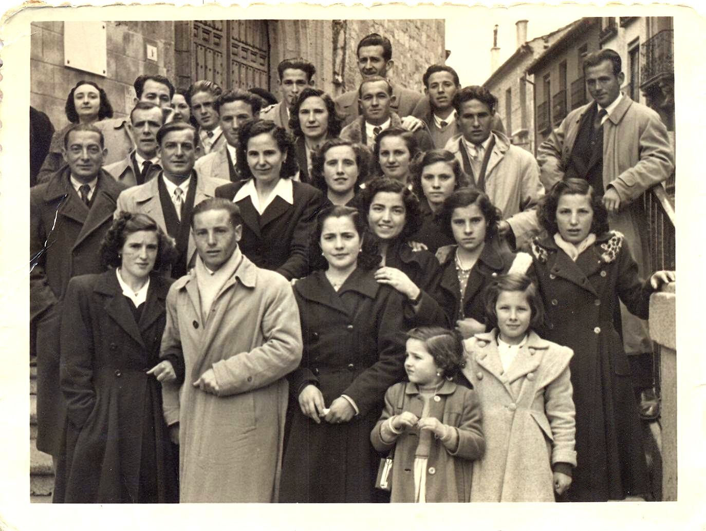 jovenes de Vellosillo década de 1950 del siglo XX